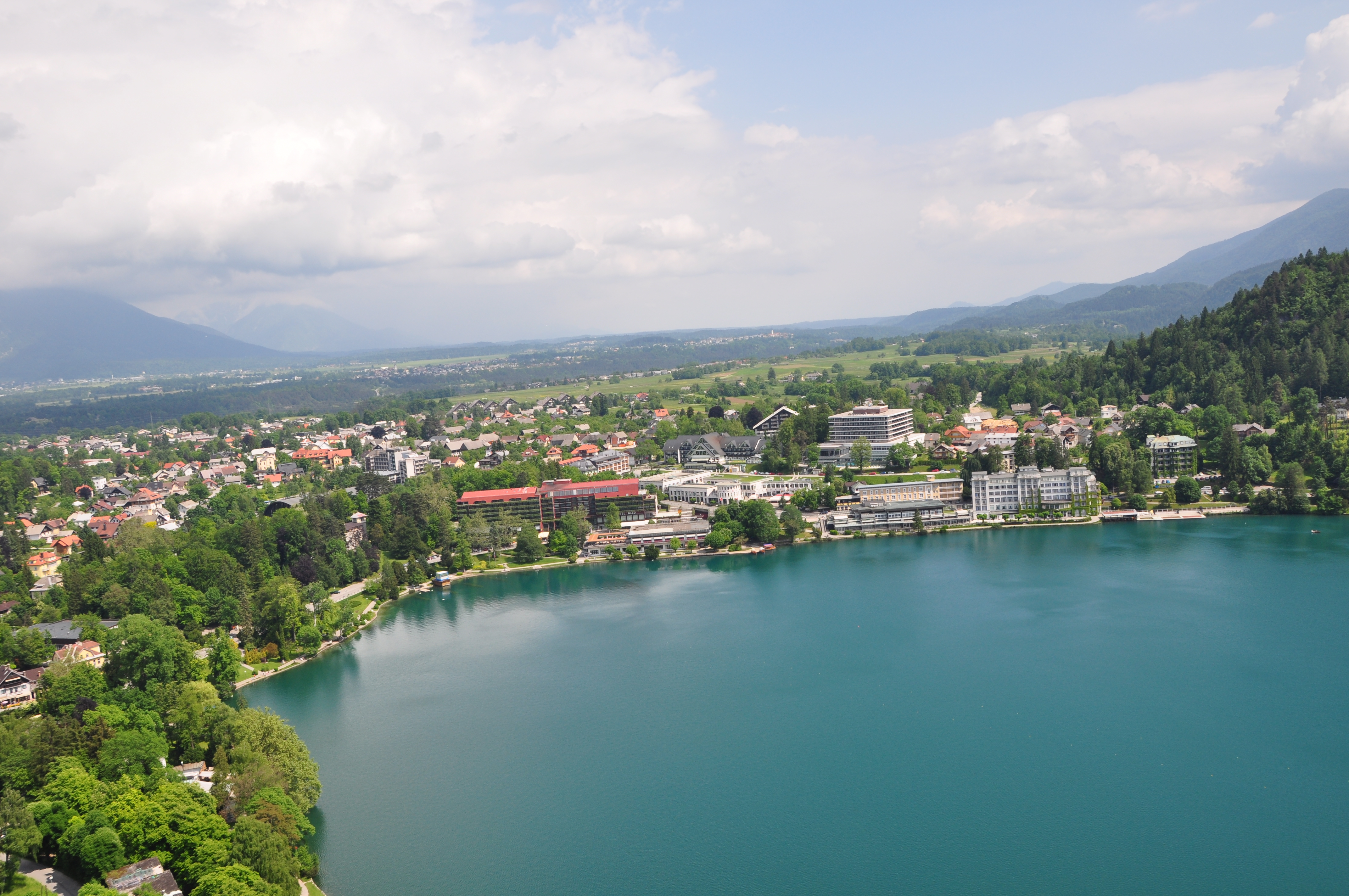 Bled, Slovenia